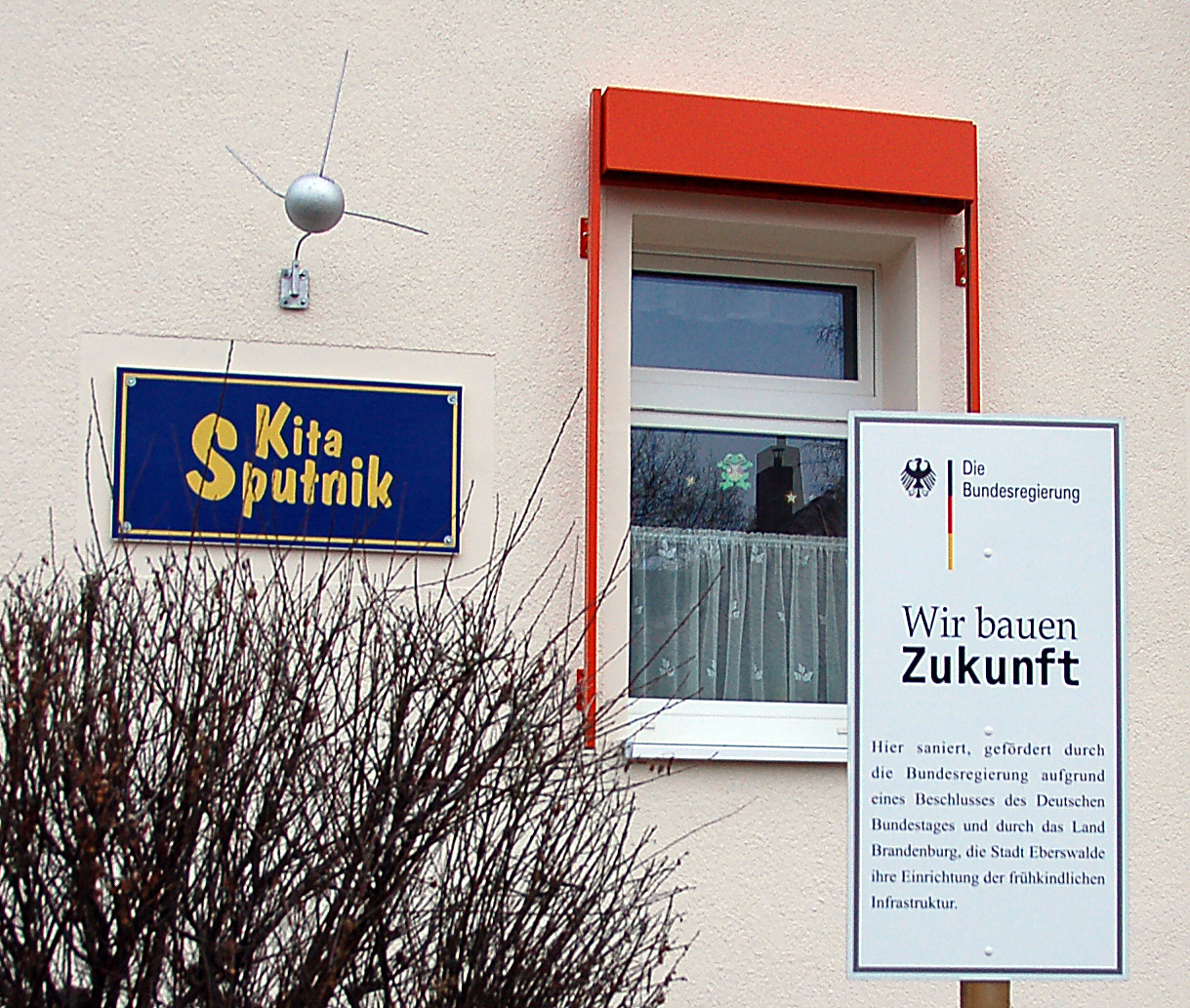 aus Kindergarten wurde KiTa, und jetzt?